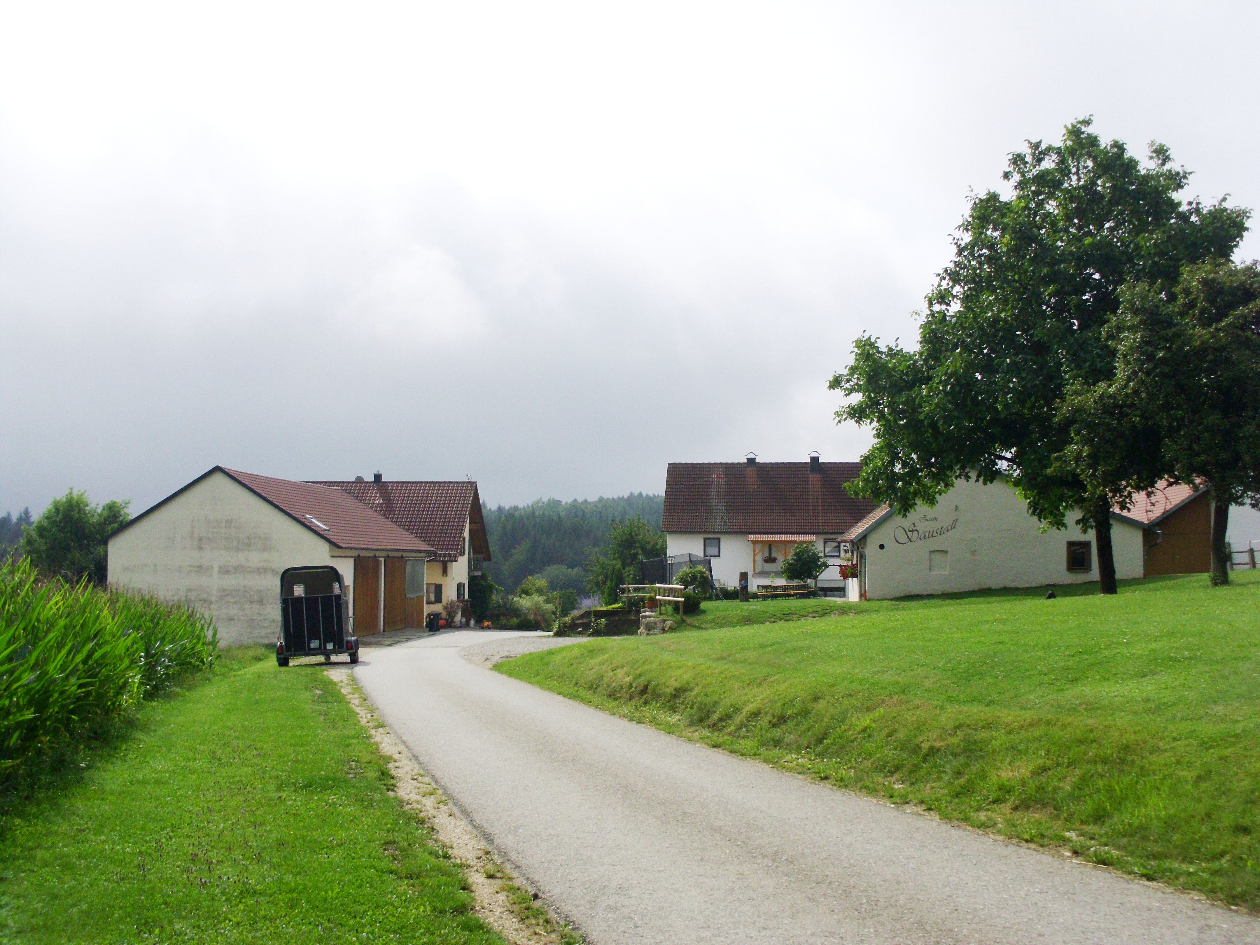 Wolpertsau, Gemeinde Rennertshofen im Landkreis Neuburg-Schrobenhausen